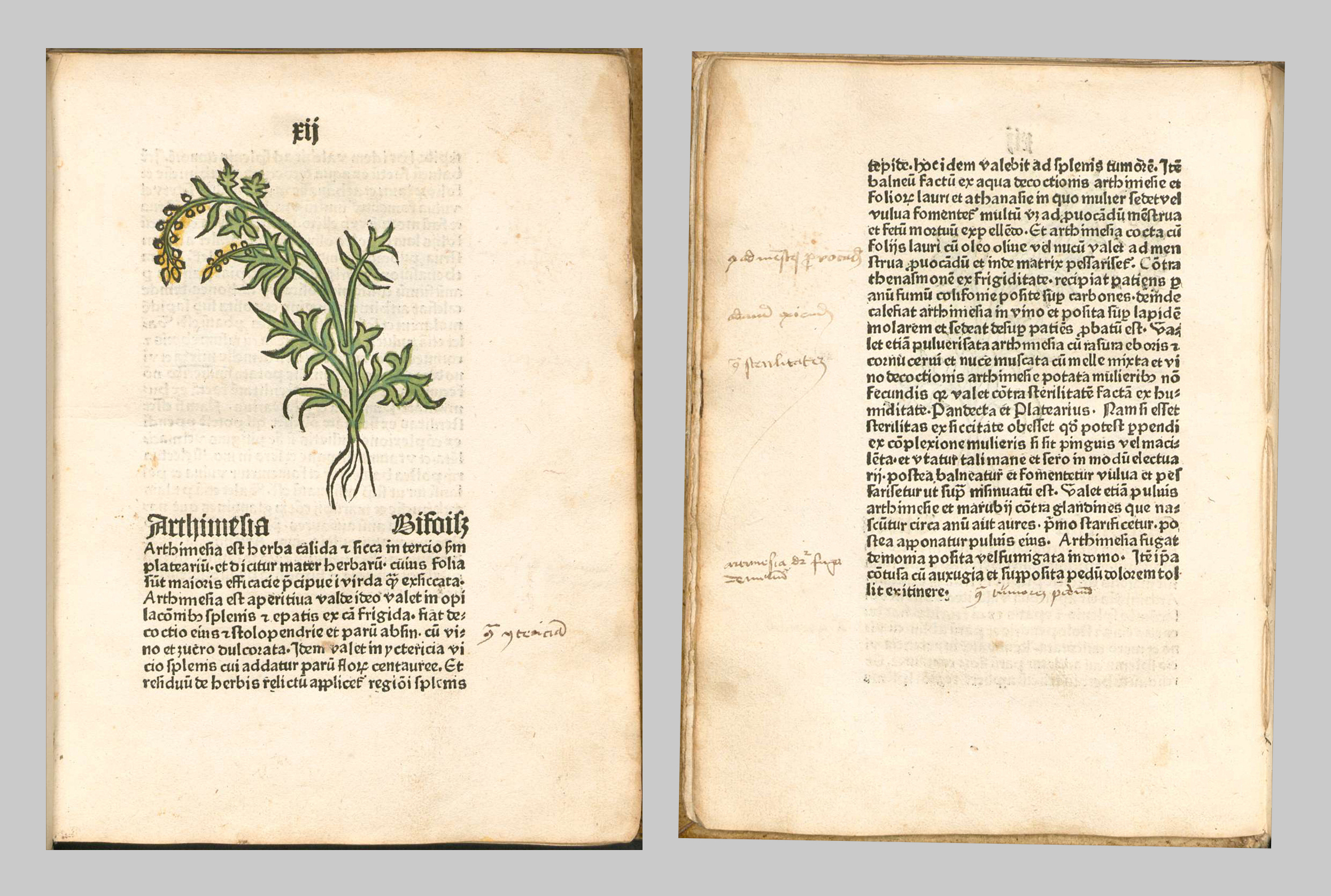 Kapitel XIIː Artemisia